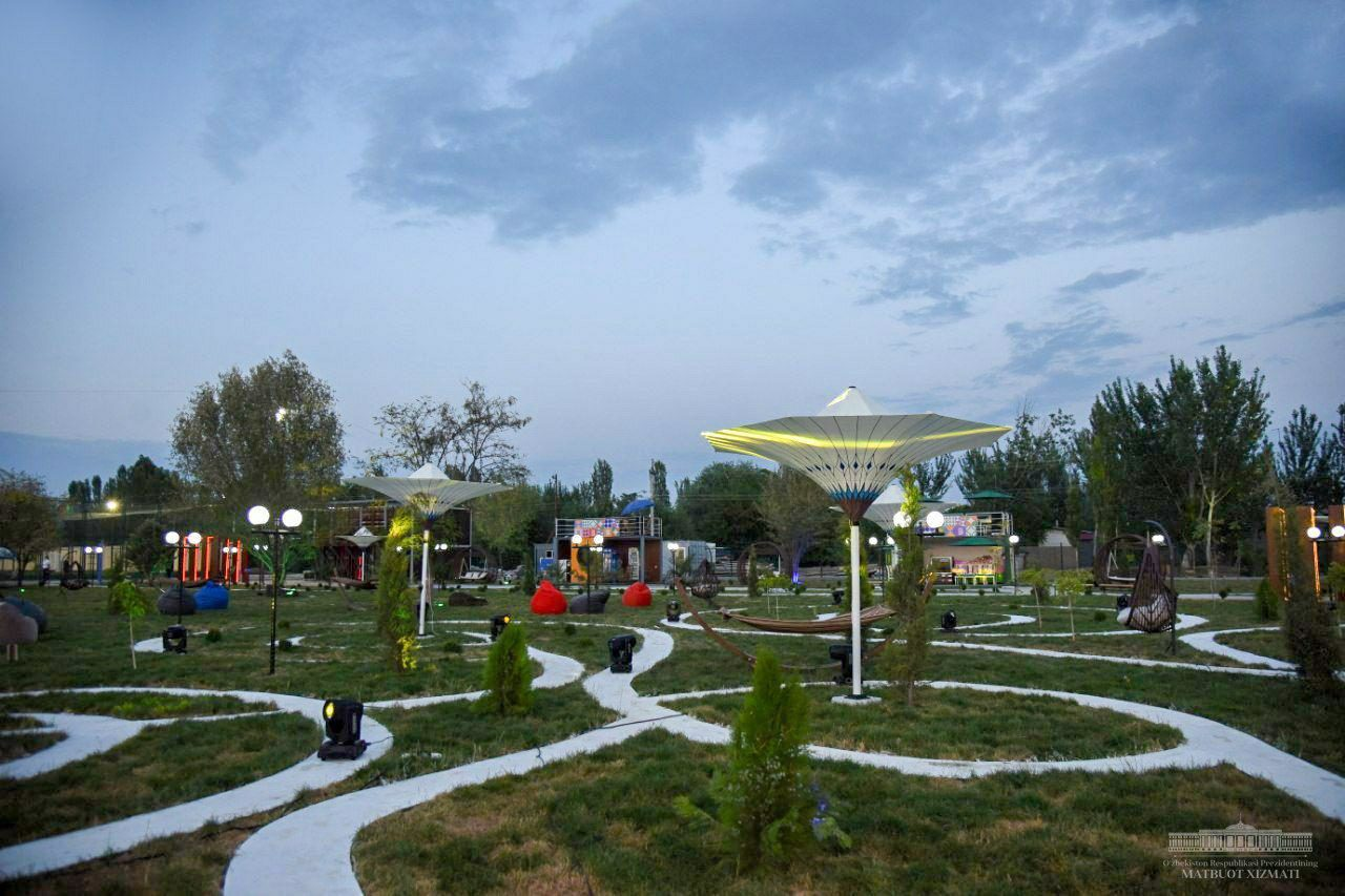 Эко-парк